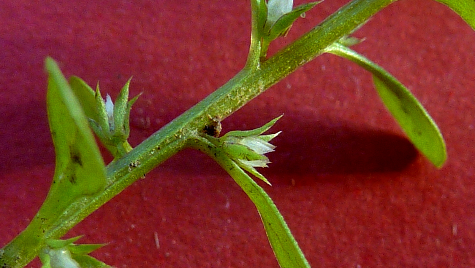 Anagallis minima (L.) Krause